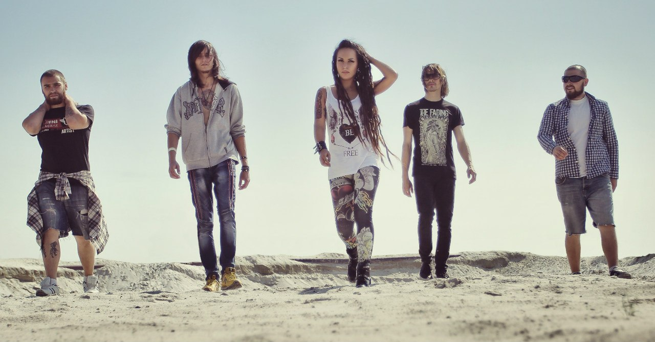 Jinjer лето 2014